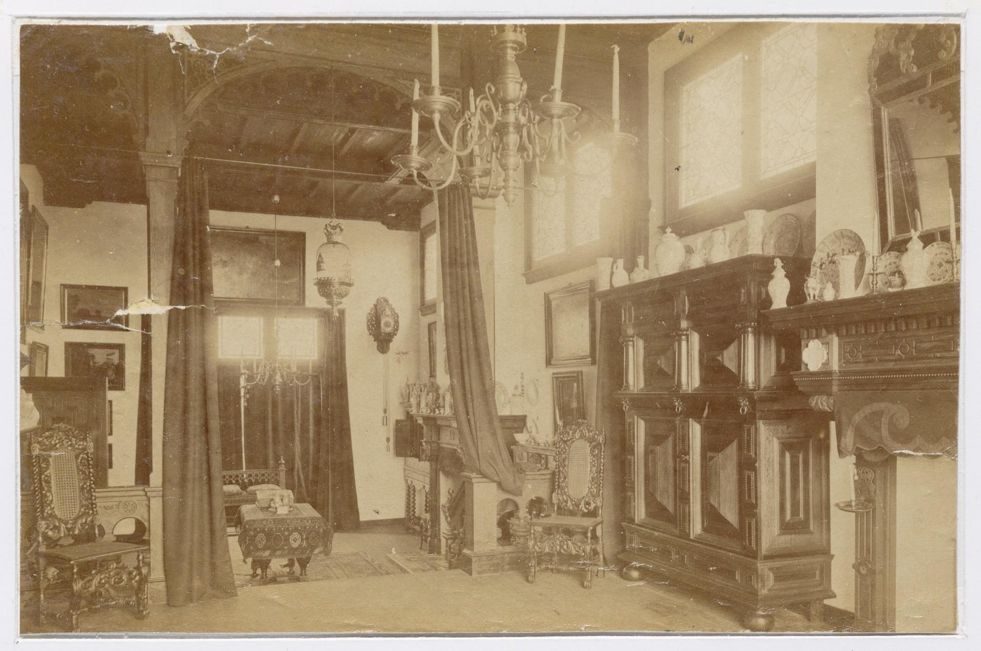 Beschrijving Amstelveenseweg 122 Interieur van het Broekerhuis, oorspronkelijk een particulier museum waar de collectie van Mej. Aaltje Fregeres te Broek in Waterland tentoongesteld werd. Geopend in 1882, gesloten in 1887. Een deel van de collectie ging naar het Stedelijk Museum. Documenttype foto Vervaardiger Oosterhuis, Pieter Collectie Collectie Stadsarchief Amsterdam: foto-afdrukken Datering 1882 t/m 1885 Inventarissen Afbeeldingsbestand OSIM00001003051 Generated with Dememorixer